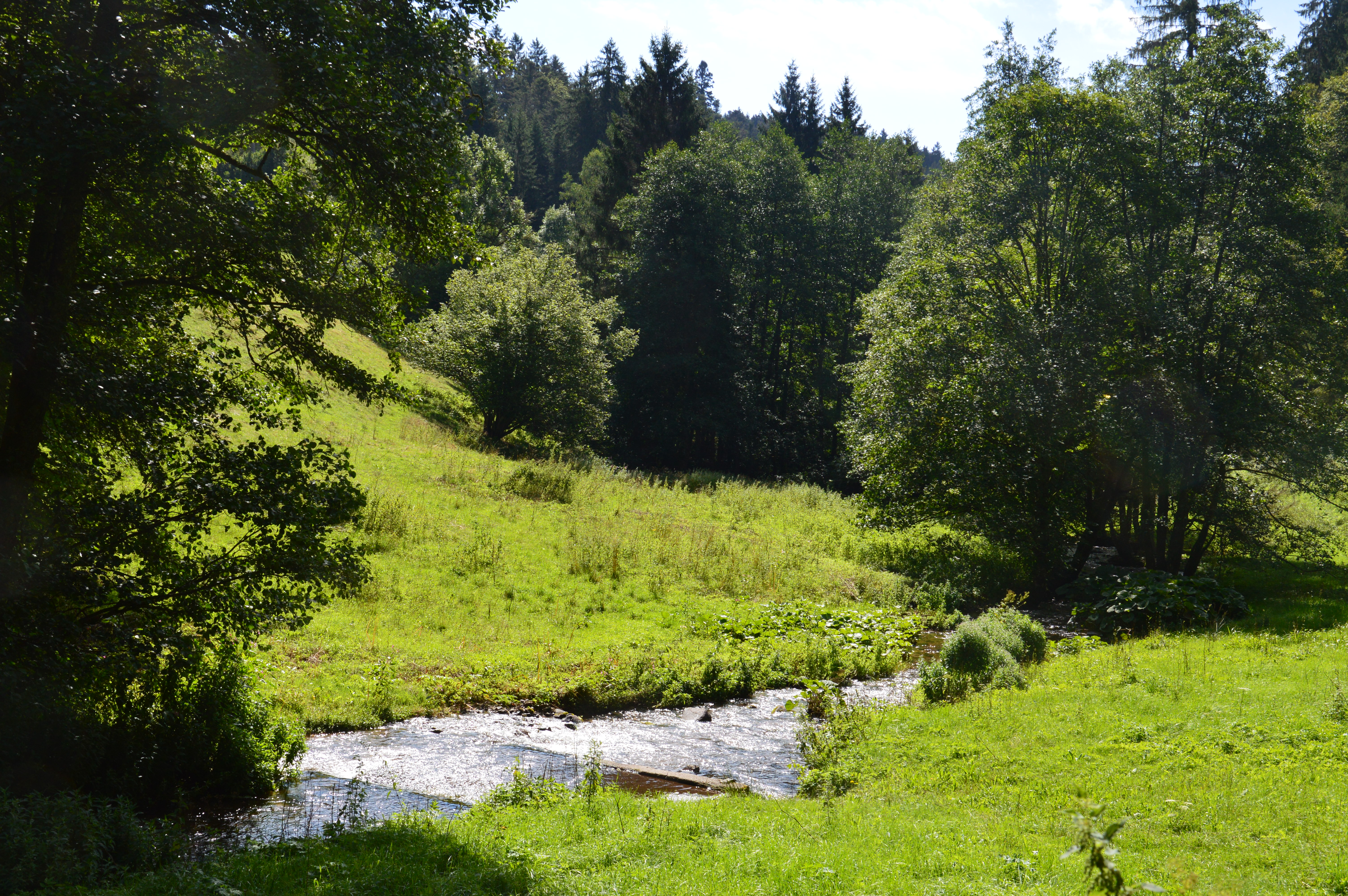 D Mettma un di linki Mettmahaldè an èm schönè Auguschtmorgè.